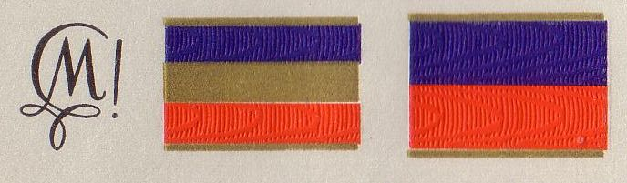 Zirkel, Corpsburschenband und Fuchsenband des Corps Misnia IV